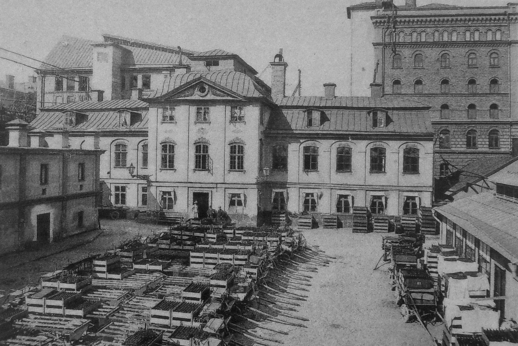 Permans malmgård på "S:t Eriks bryggerin:s" gamla bryggeriområdet på Kungsholmen i Stockholm 1890